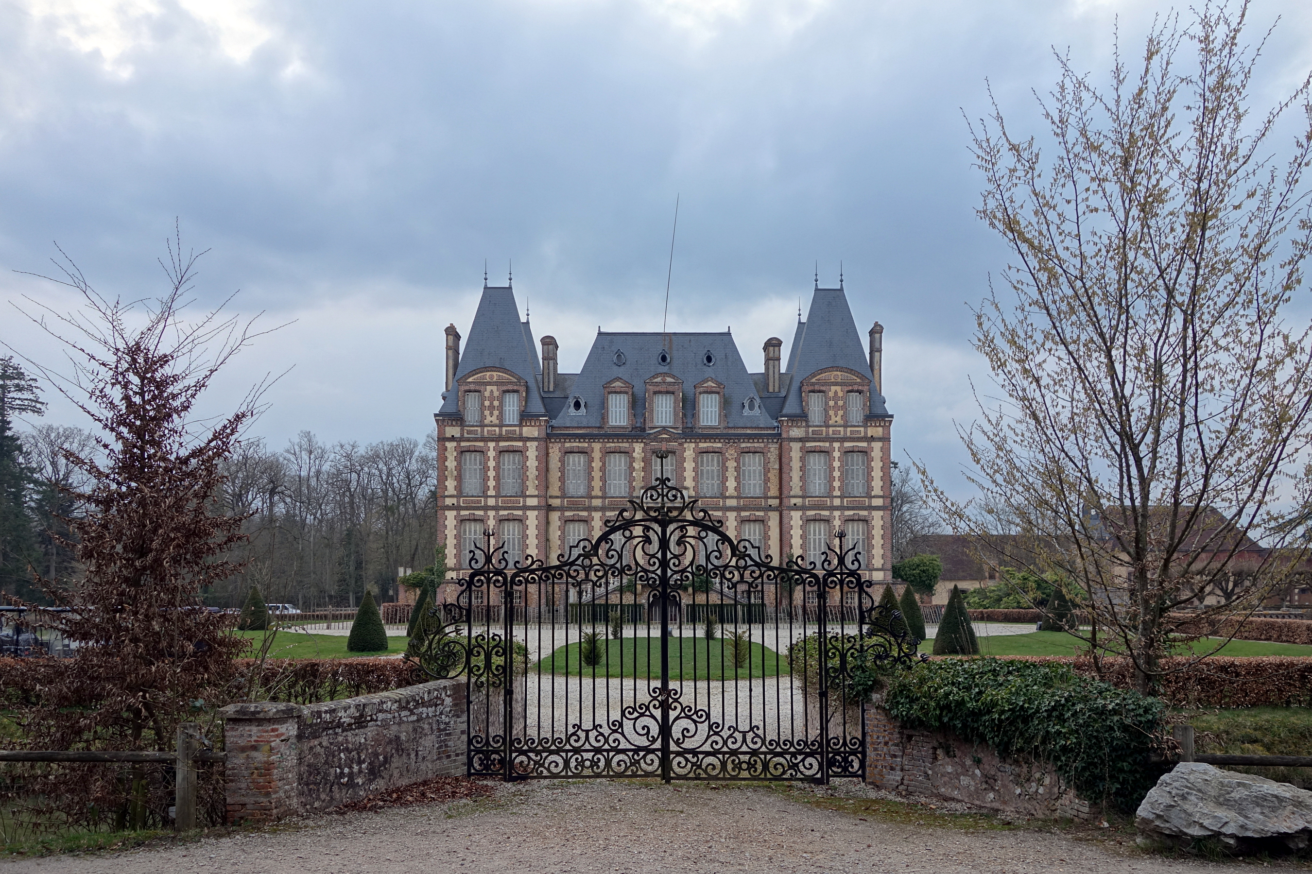 Le château des Bois Francs à Les Barils près de Verneuil-sur-Avre (Eure).